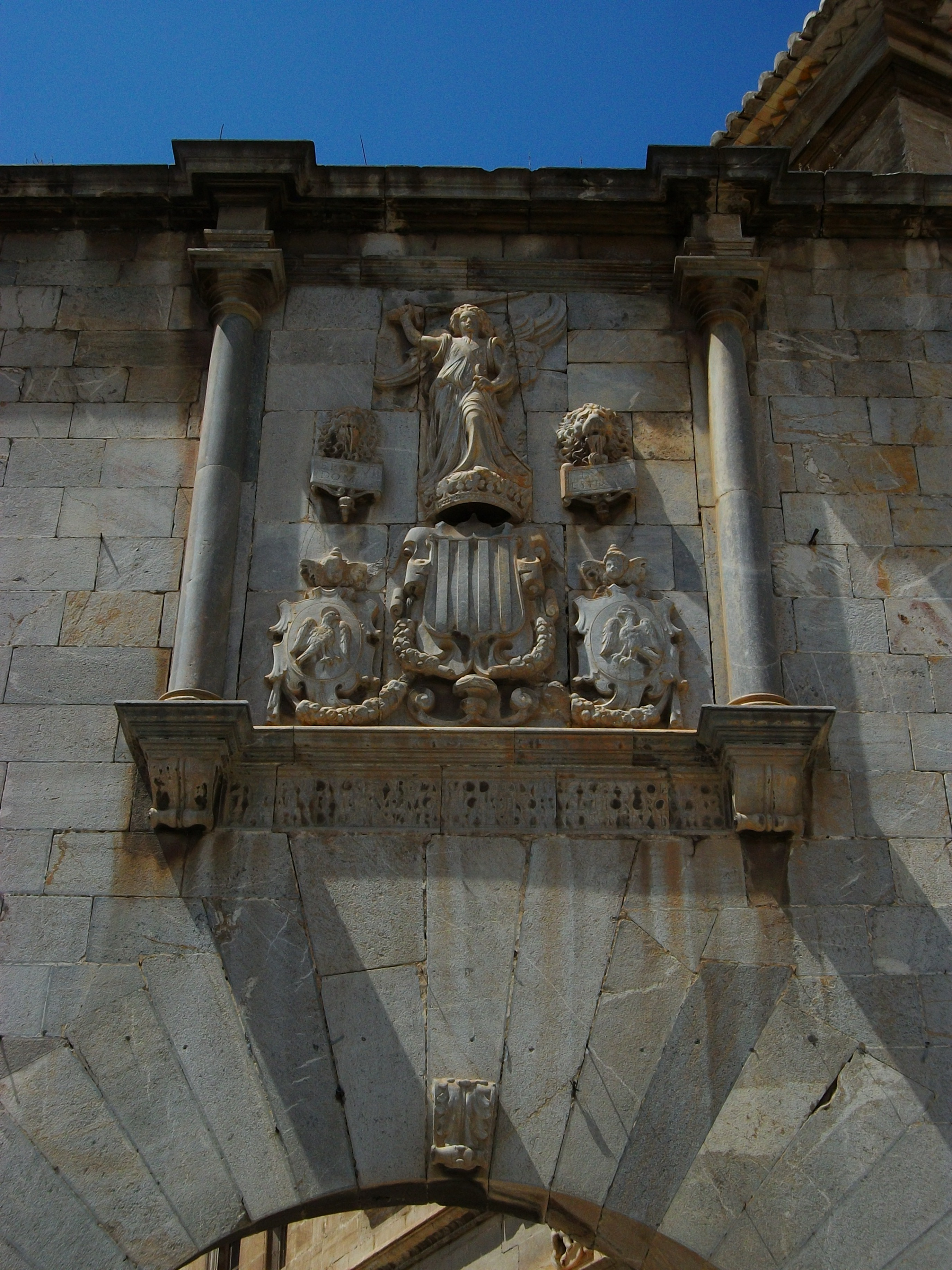 Escuts de la ciutat d'Oriola i del Regne de València a la porta de l'Olma, de Callosa o de Crevillent de l'antiga muralla de la ciutat d'Oriola. La inscripció hi diu: "EN LO ANY DE NOSTRA REDEMCIO IVDLVIII SE ACABA AQEST POR/ TAL SENT IVRATS LOS MOLT MAGNIFICHS SENORS MELCHIOR GROADELLAS/ IVAN FERNANDES DE TVESTA FRANCES ALMODOVER ANDRE MANRESA IVAN MIRO".